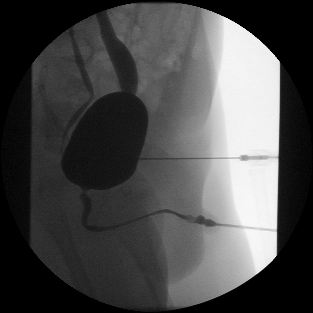 MCU: VUR beidseits, unauffällige Urethra